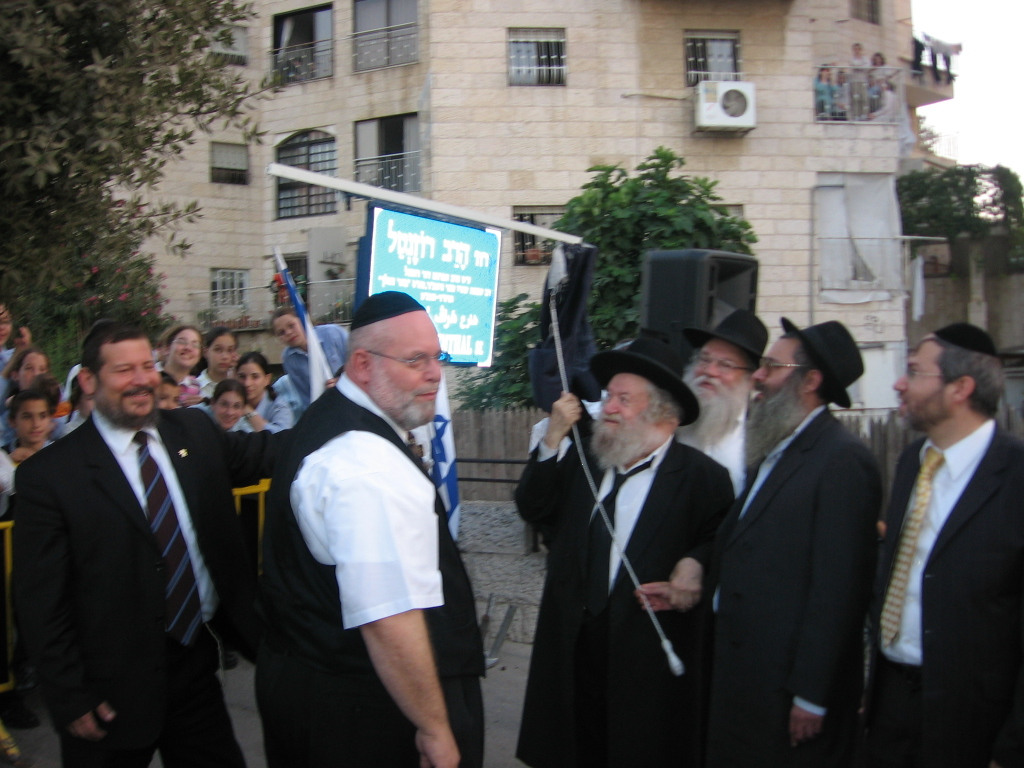 הרב יעקב ניסן רוזנטל מסיר את הלוט ברחוב הרב רוזנטל בירושלים על שם אביו